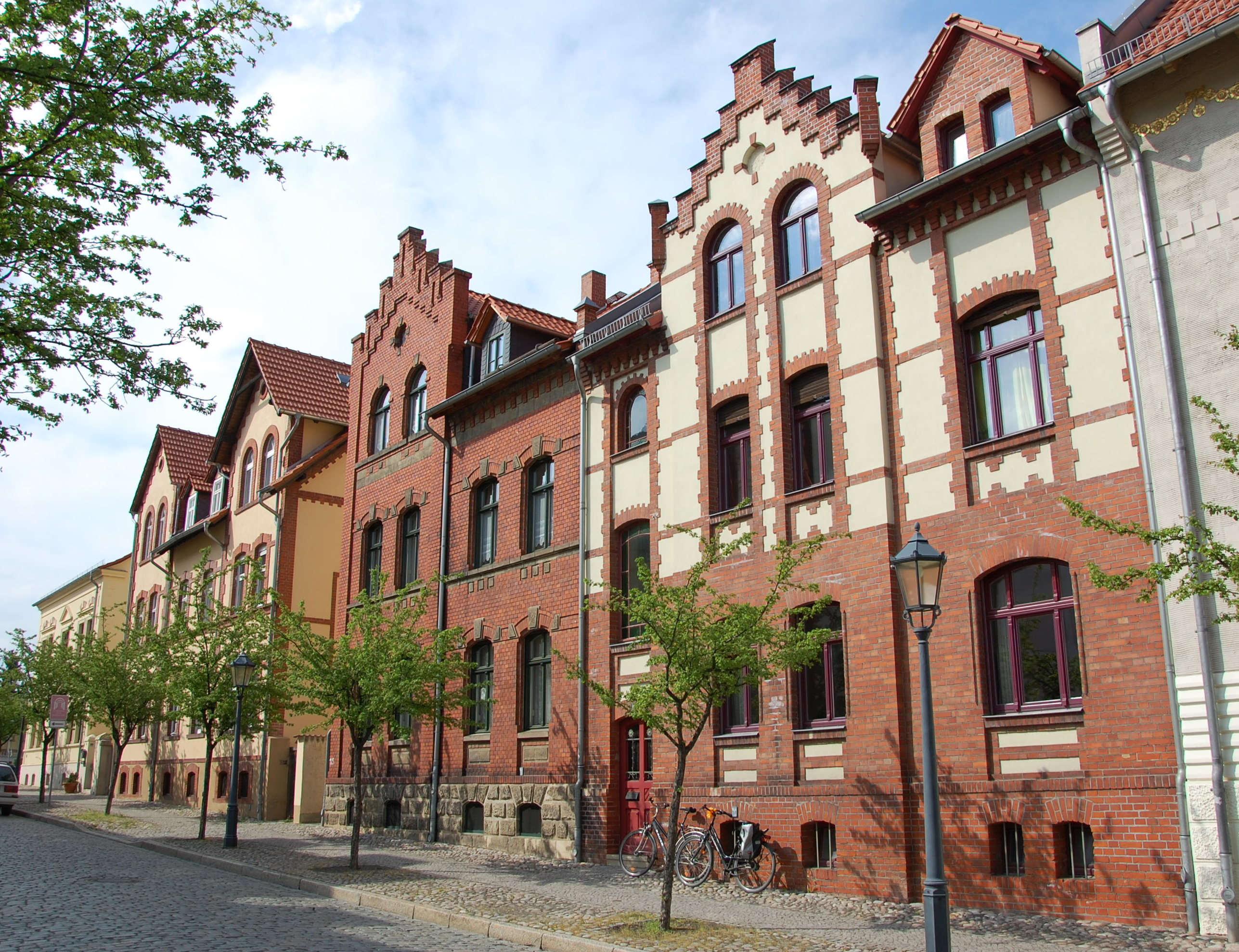 Häuserzeile Marschlinger Hof 12-16 in Quedlinburg